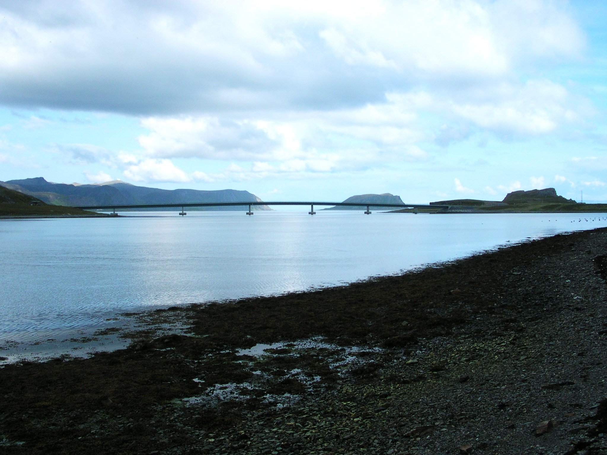 Veidnesbrua, Kobbholet, Magerøya, Nordkapp